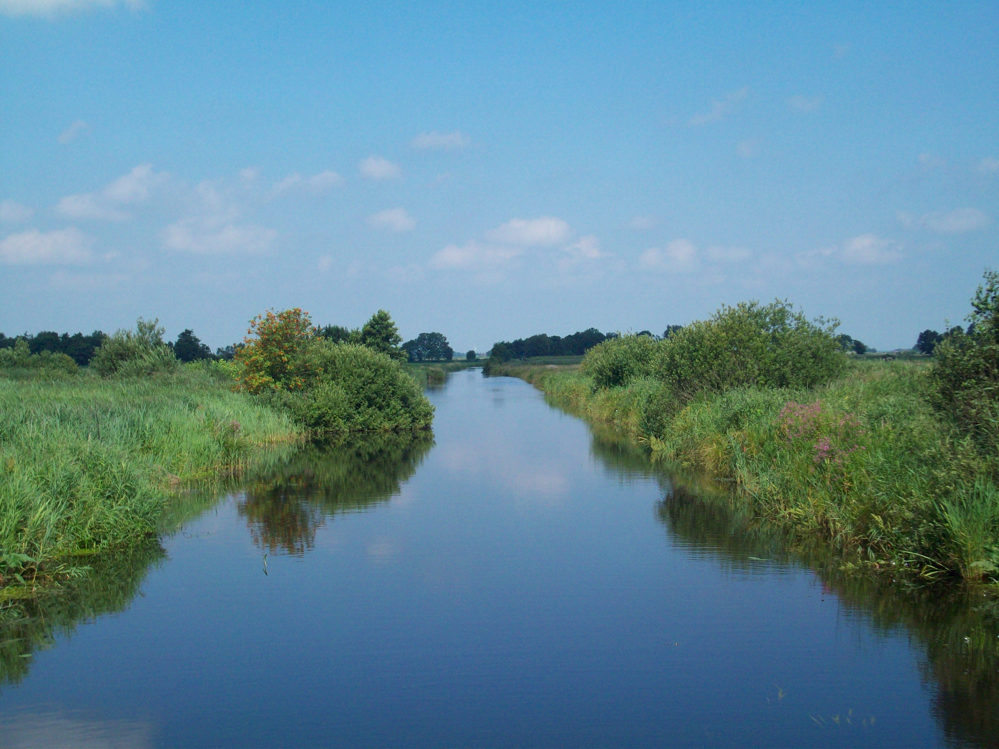 De Alde Feanen